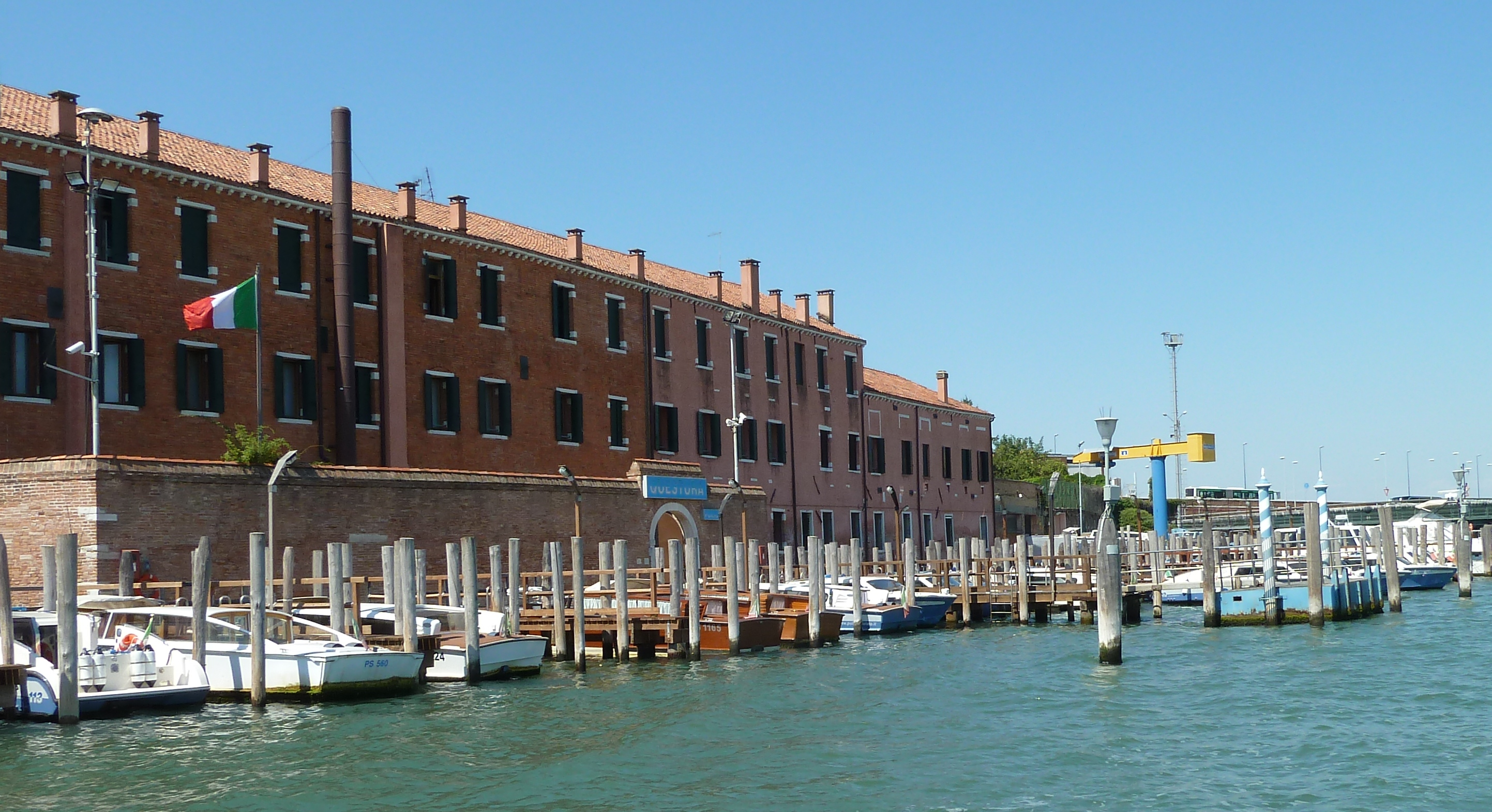 questura